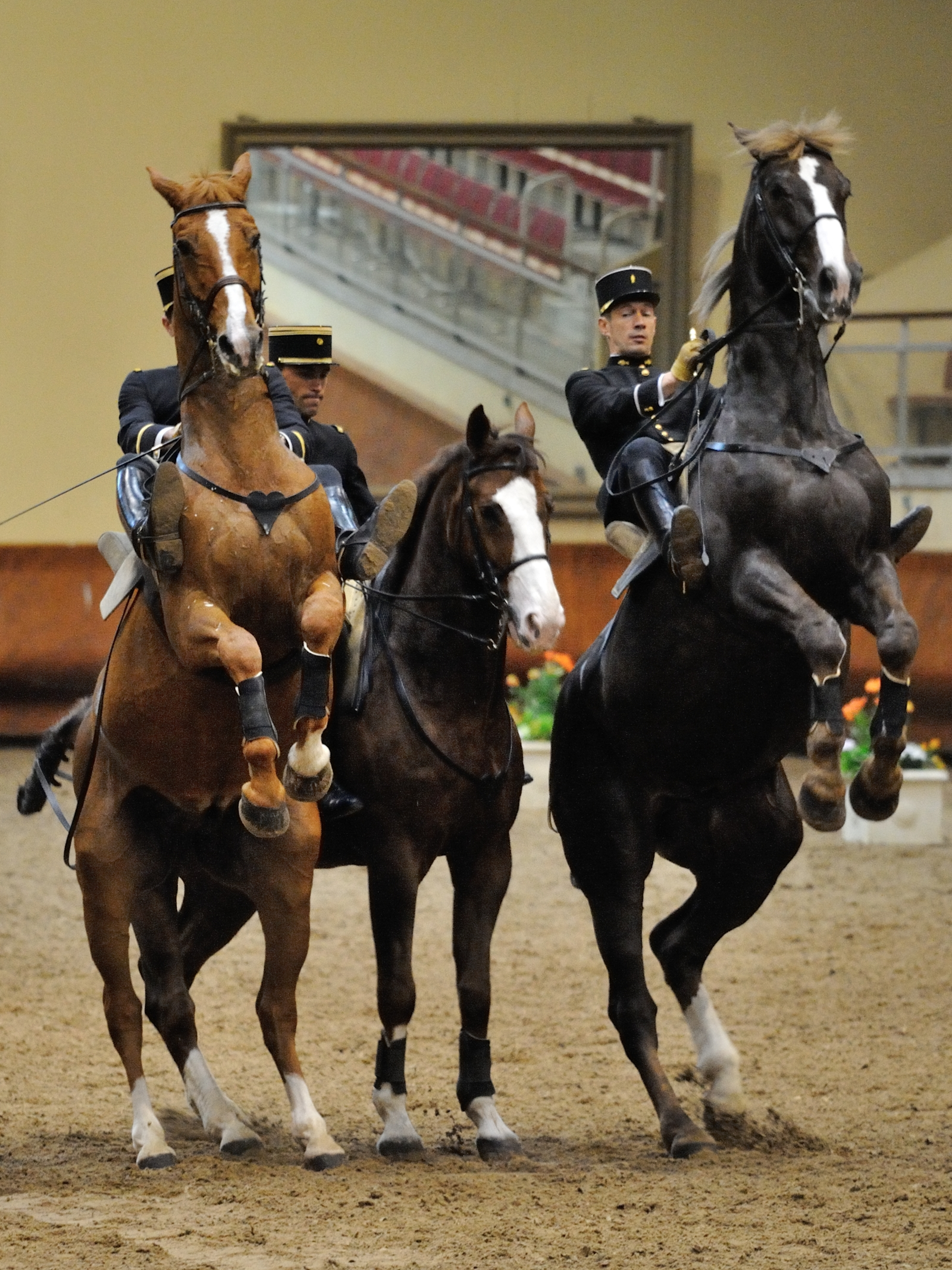 Présentation publique du Cadre noir, École nationale d'équitation, Saumur - Courbettes montées